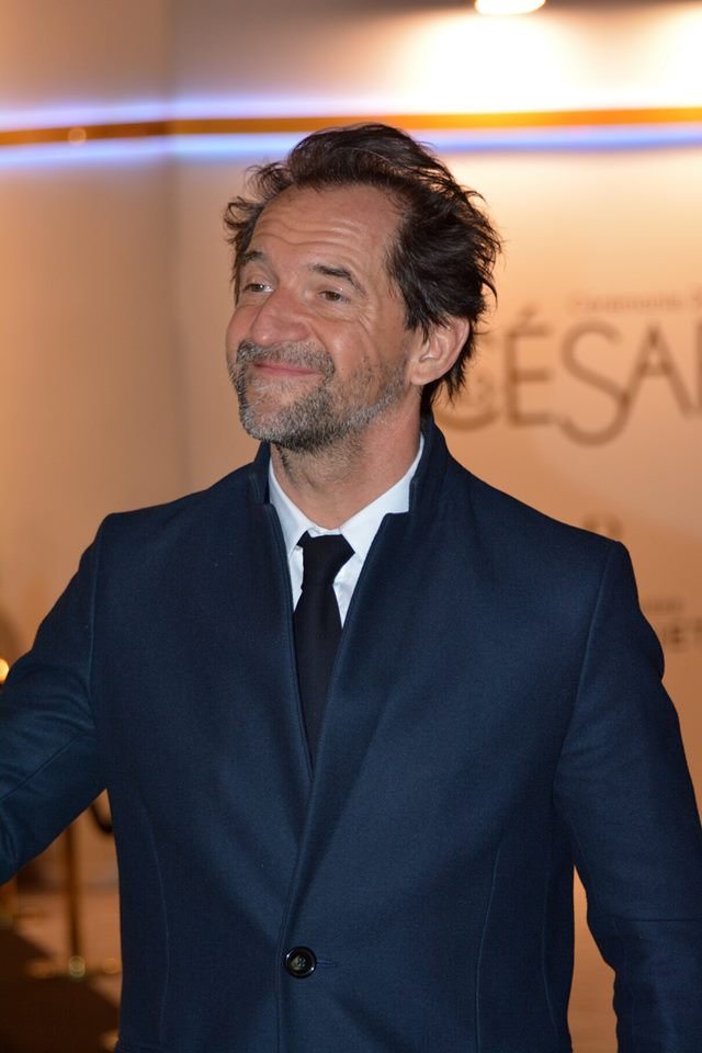 Stéphane de Groodt à la cérémonie des César du cinéma